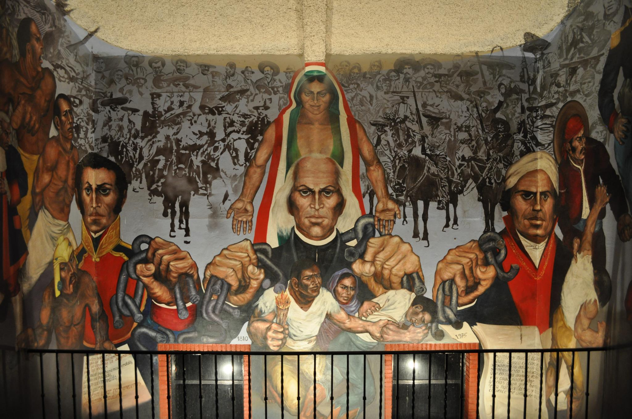 Mural de Ariosto Otero